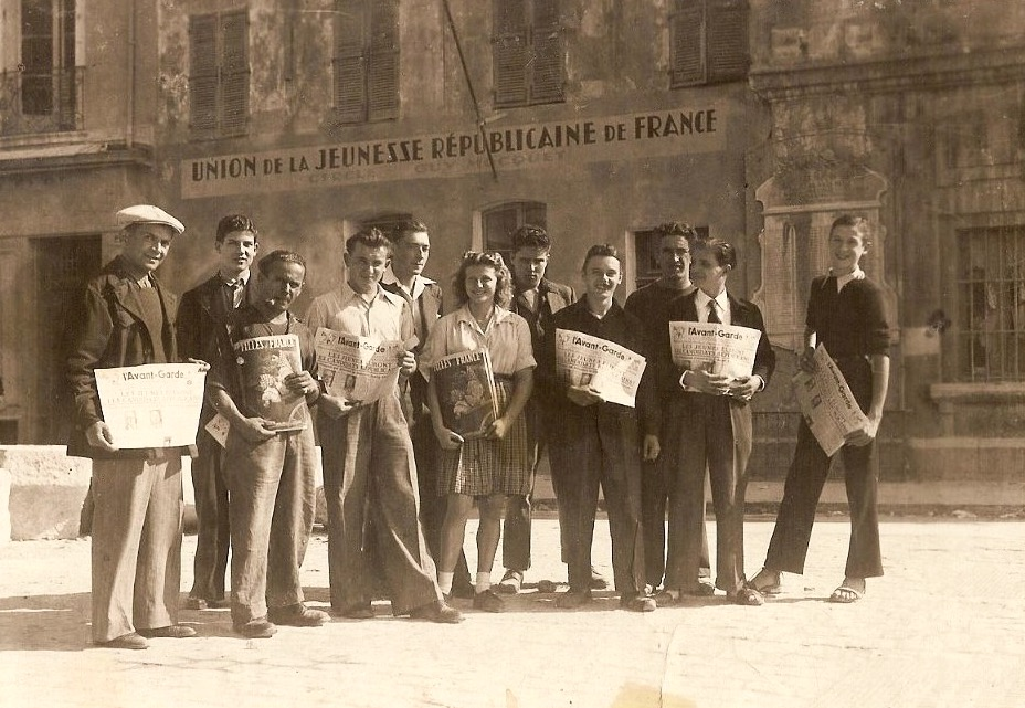 Hyères 1946, Jeunesse communiste (alors appelée Union de la Jeunesse Républicaine de France), vente du journal Avant-Garde devant le local intitulé "Cercle Guy Moquet"